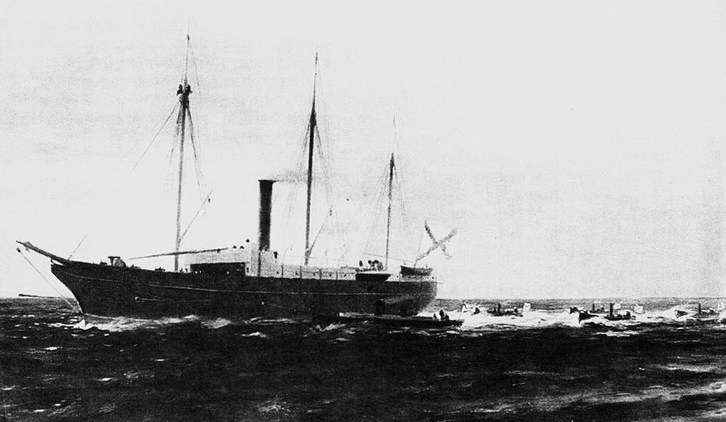 "Великий князь Константин" в составе Черноморского флота